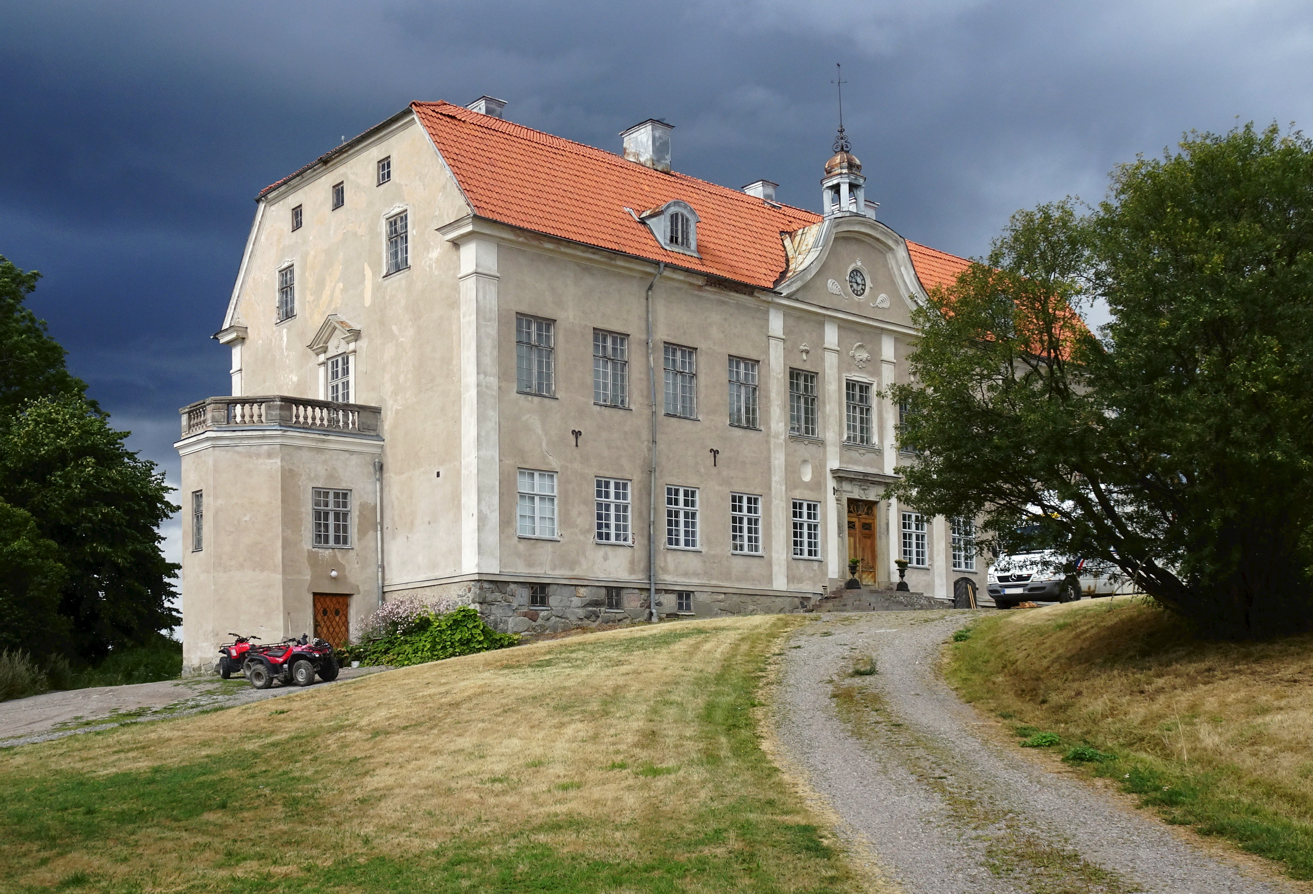 Ådö herrgård, huvudbyggnad